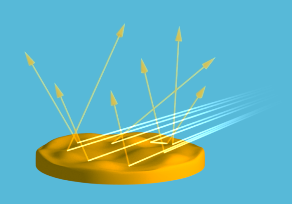 การสะท้อนแสงแบบพร่า